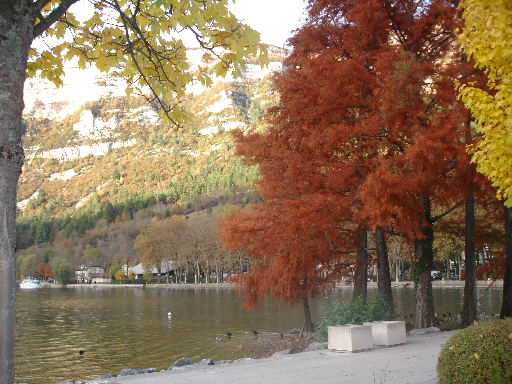 Vue du lac de Nantua en automne du côté ville.